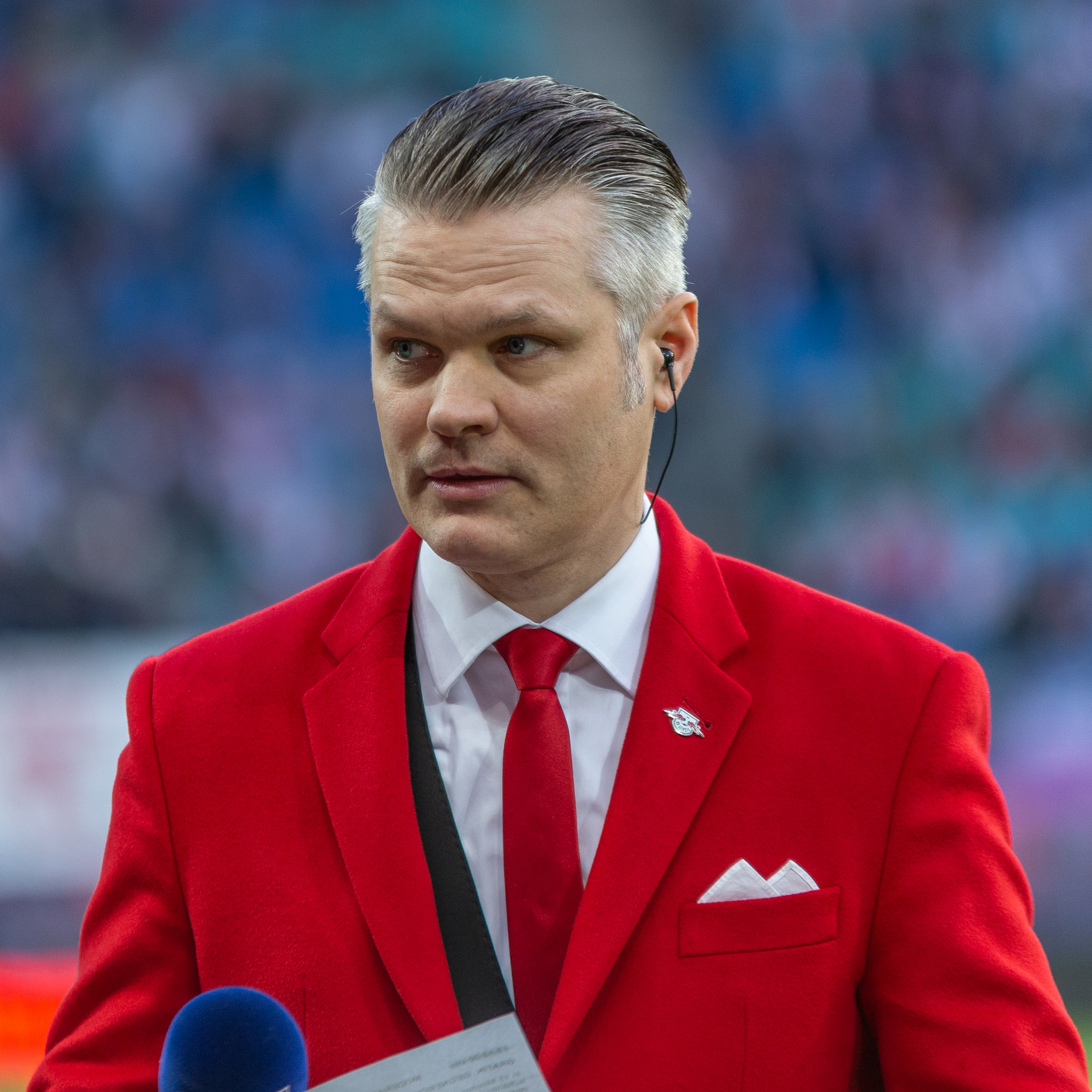 Fußball, Männer, 1. Bundesliga, RB Leipzig - Hertha BSC; Tim Thoelke (Stadionsprecher RB Leipzig); Porträt, Einzelbild